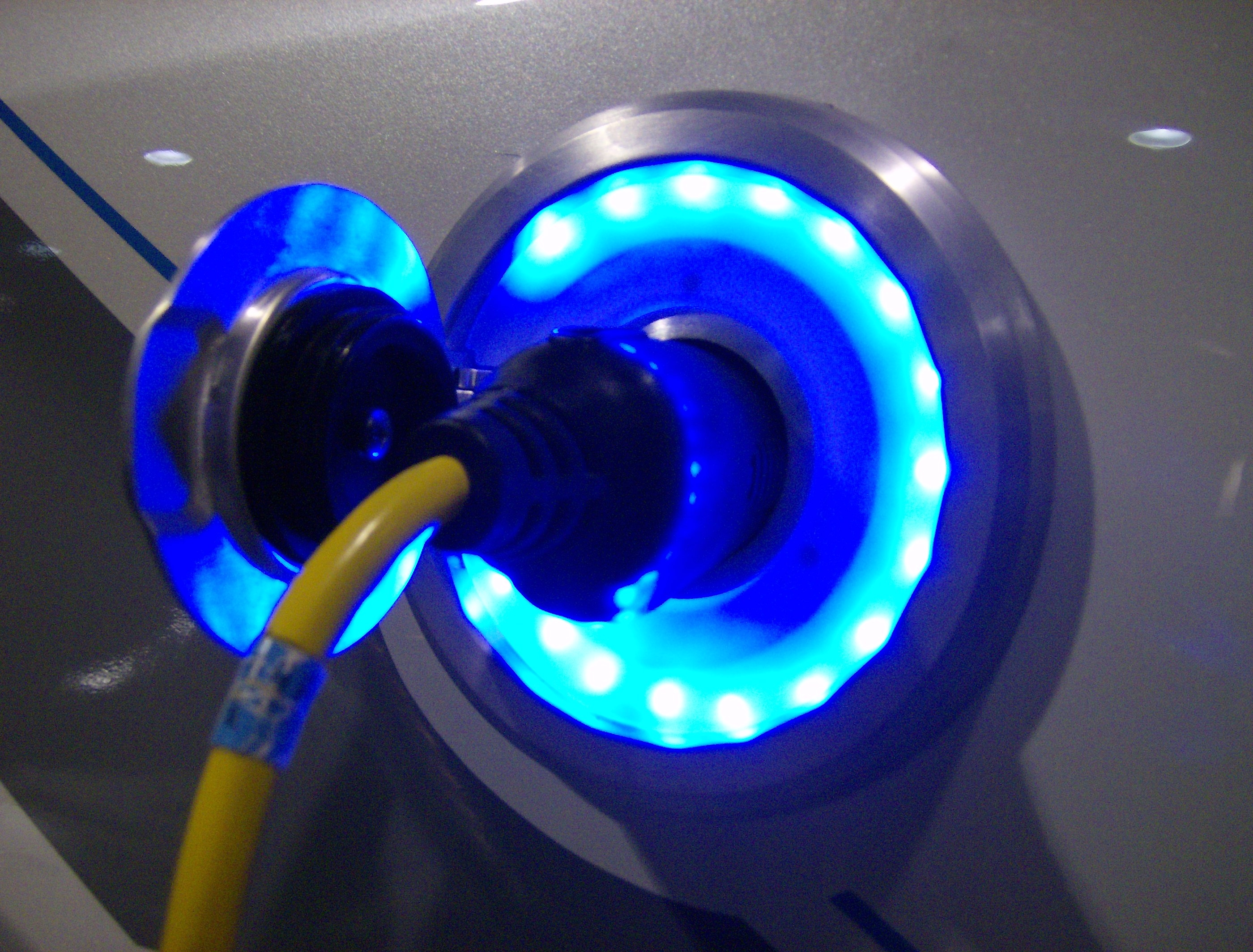 Autofahren mit elektrischem Strom